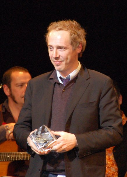 Arnaud Desplechin aux Etoiles d'or du cinéma français